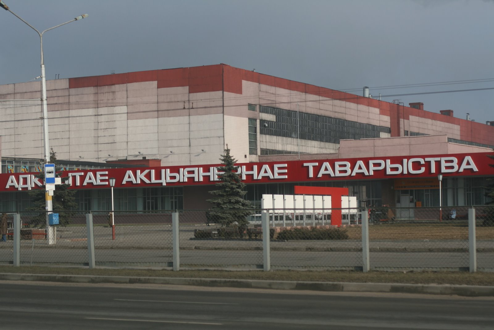 Babruysk